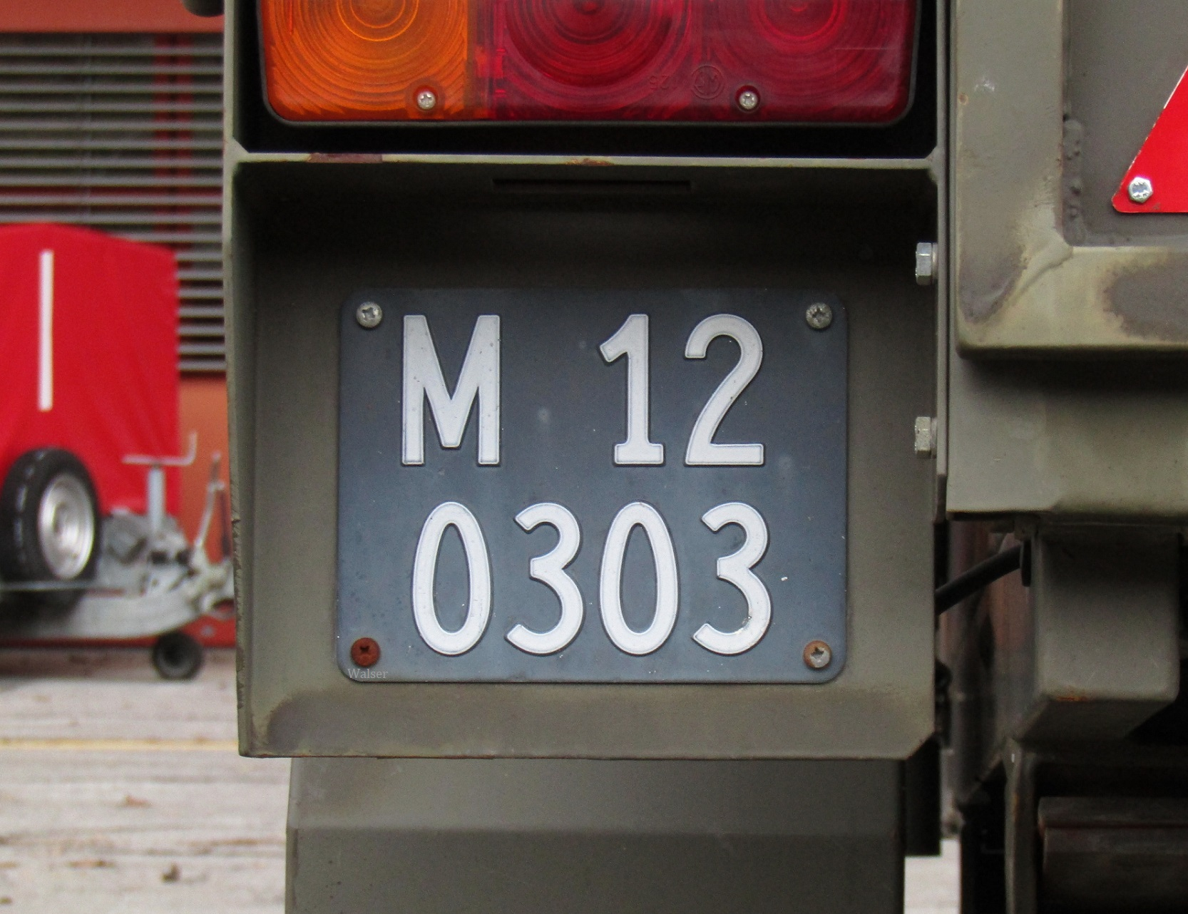 Militär Anhänger Kontrollschild Schweiz quadratisch